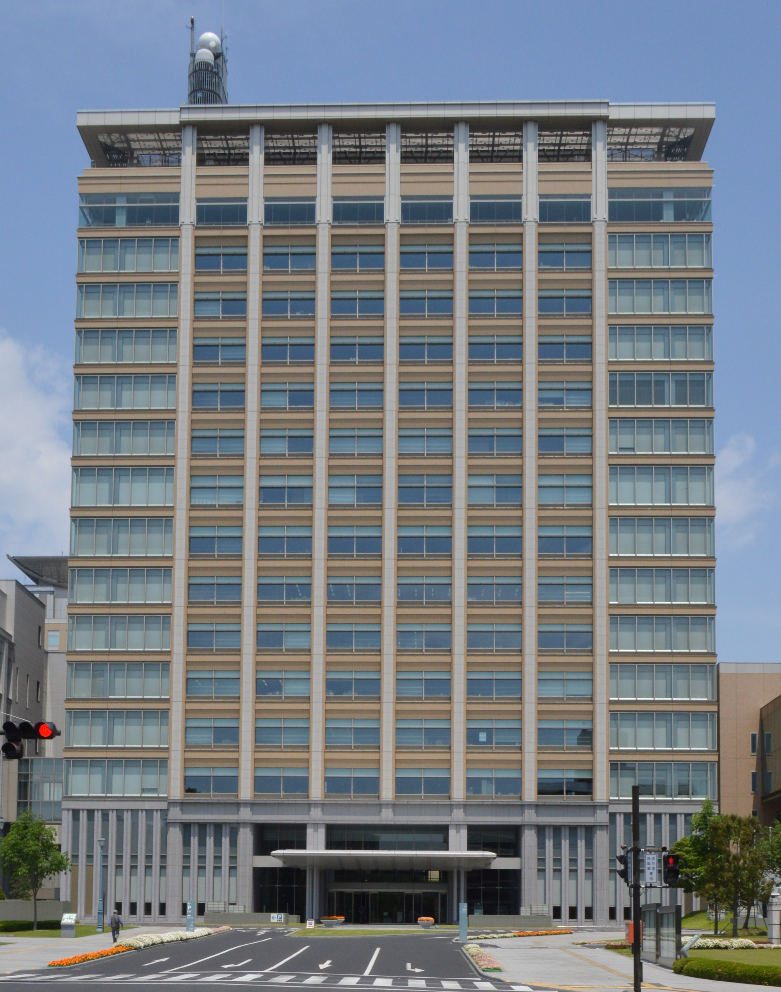 栃木県宇都宮市 栃木県庁舎